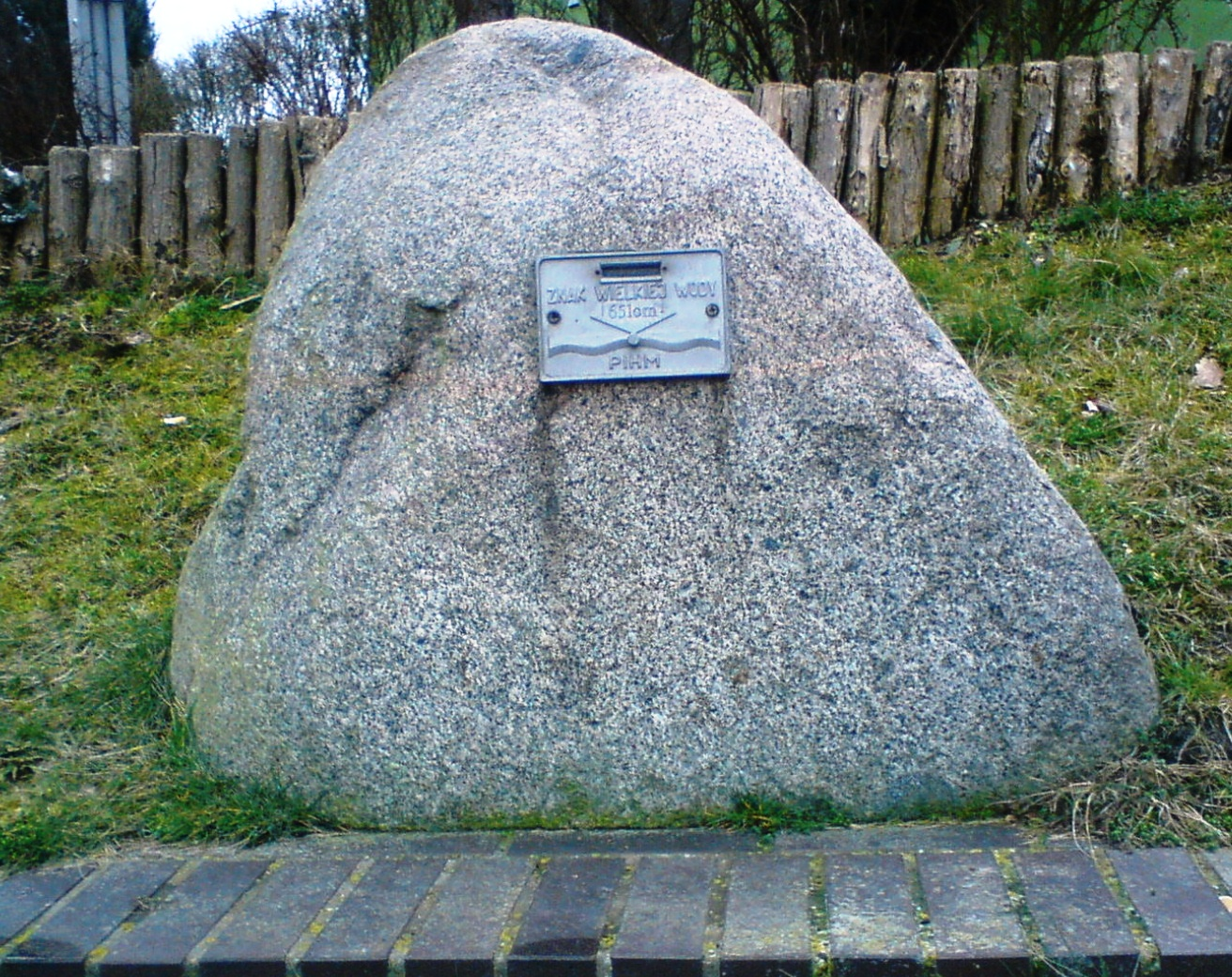 Znak Wielkiej Wody – pomnik stojący na terenie Nadzoru Wodnego Słubice (port rzeczny), upamiętnia najwyższy stan rzeki Odry (651 cm) na terenie Słubic podczas powodzi tysiąclecia.